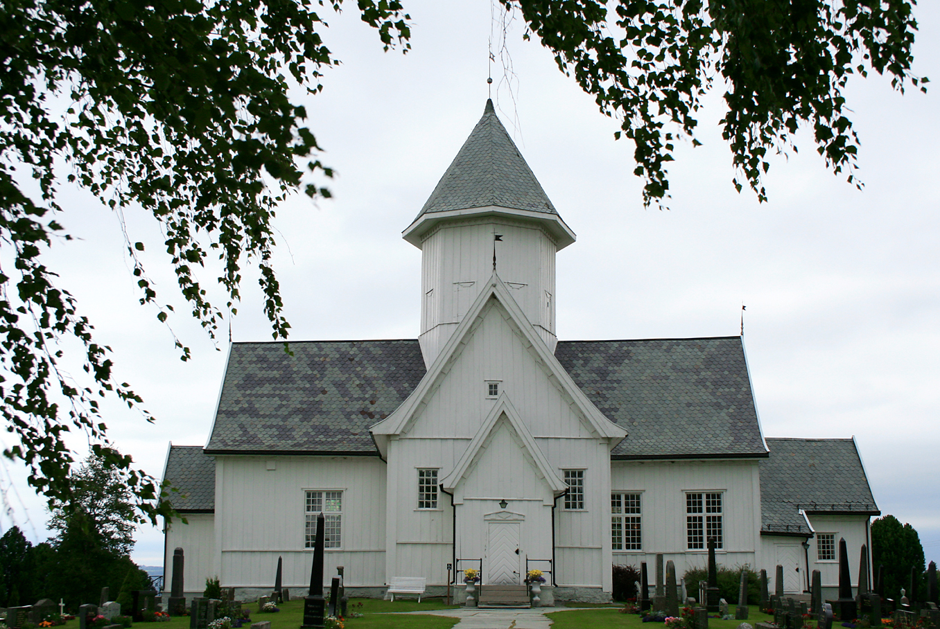 Kolbu kirke, Østre Toten.